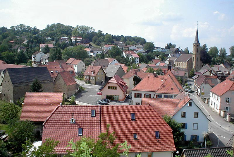 Blick vom Schlossberg über Waldagnelloch